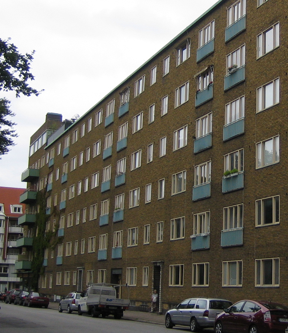 Malmgården, Malmö